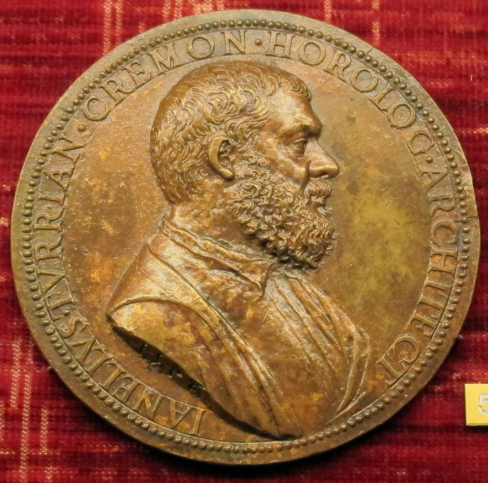 Medaglia di Giannello della Torre, 1548